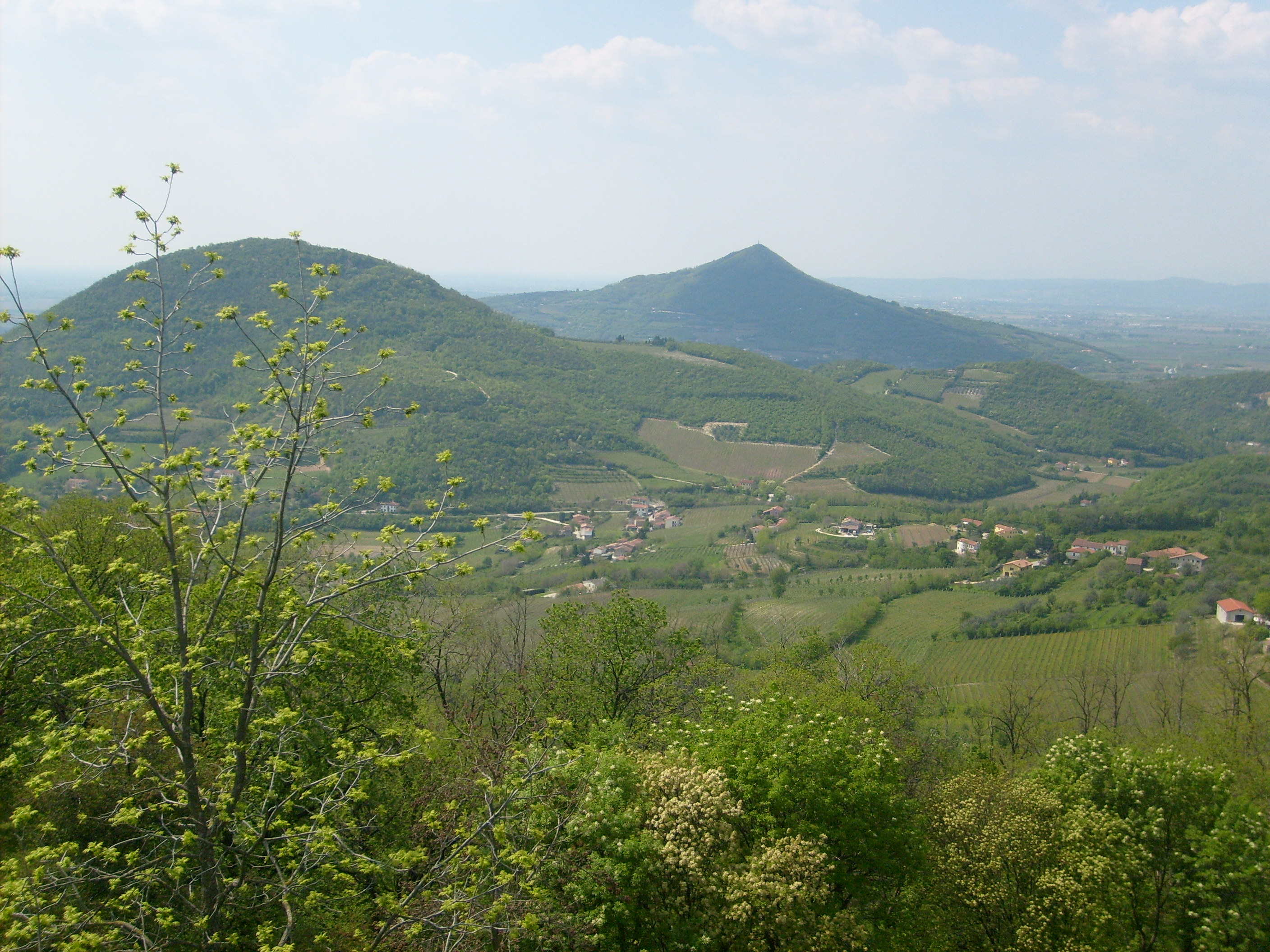 Il Monte Gemola visto dal Monte Rusta.